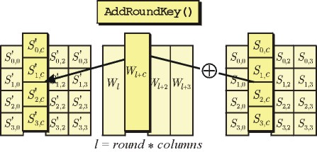 AES Add Round Key procedure